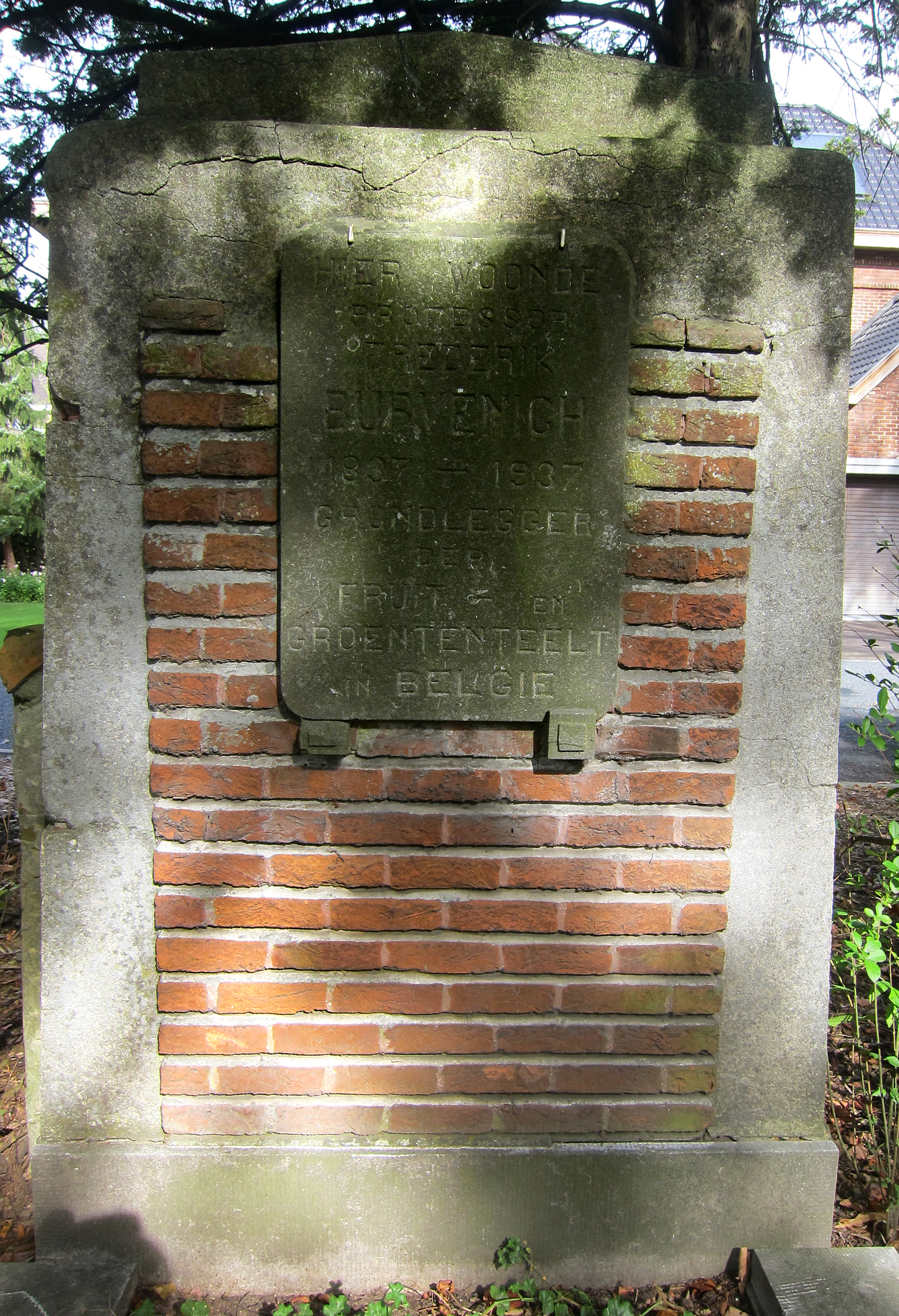 Herinneringsplaat aan de voormalige woning van Frederik Burvenich aan de Voordries te Gentbrugge geplaatst bij de herdenking van de 100e verjaardag van zijn geboorte